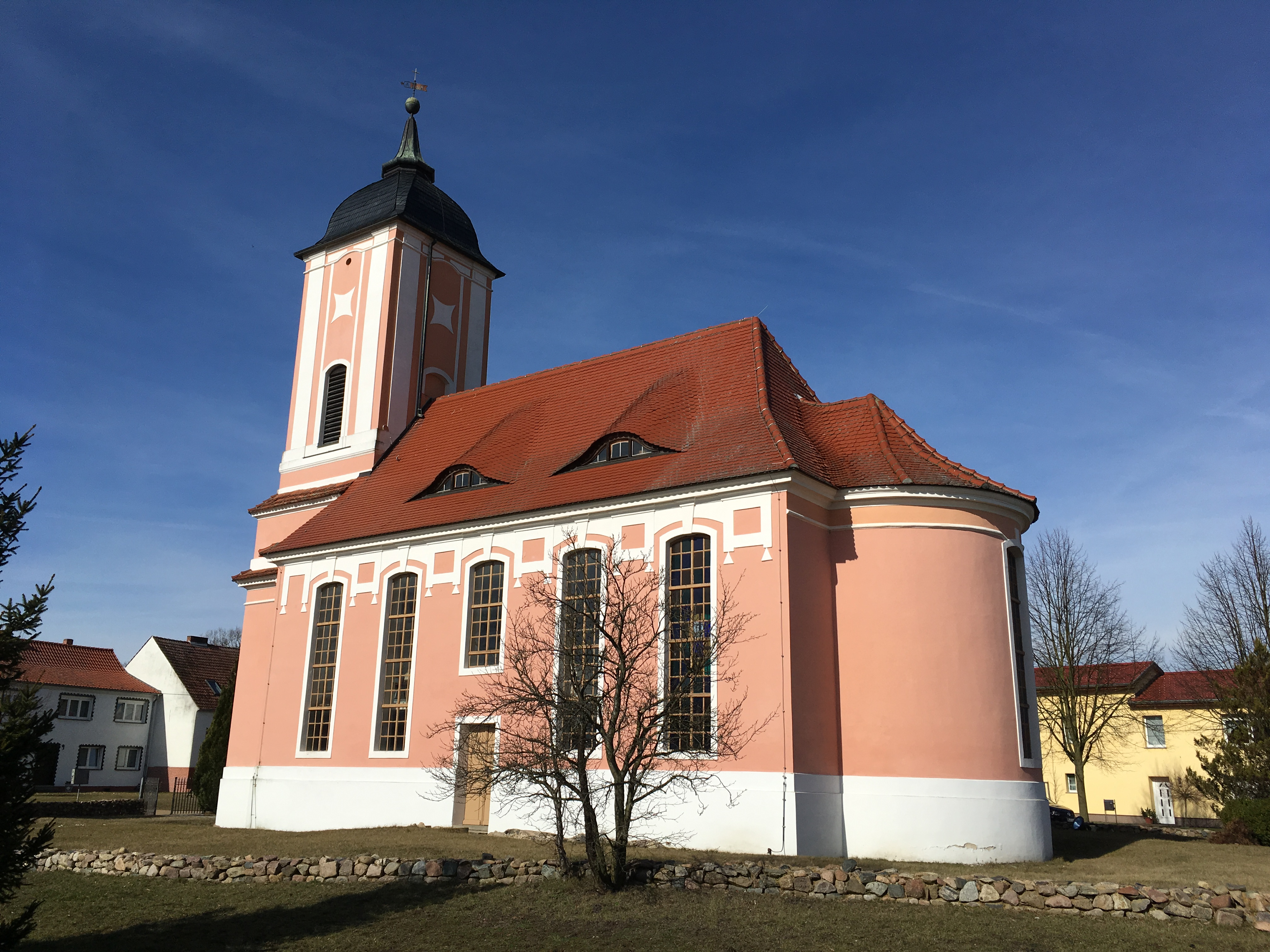 Die Dorfkirche Reesdorf entstand im Jahr 1775 vermutlich auf den Resten eines Vorgängerbaus aus dem 14. Jahrhundert. Die Kanzel und die Hufeisenempore stammen aus der Bauzeit; die Orgel aus der Mitte des 19. Jahrhunderts.